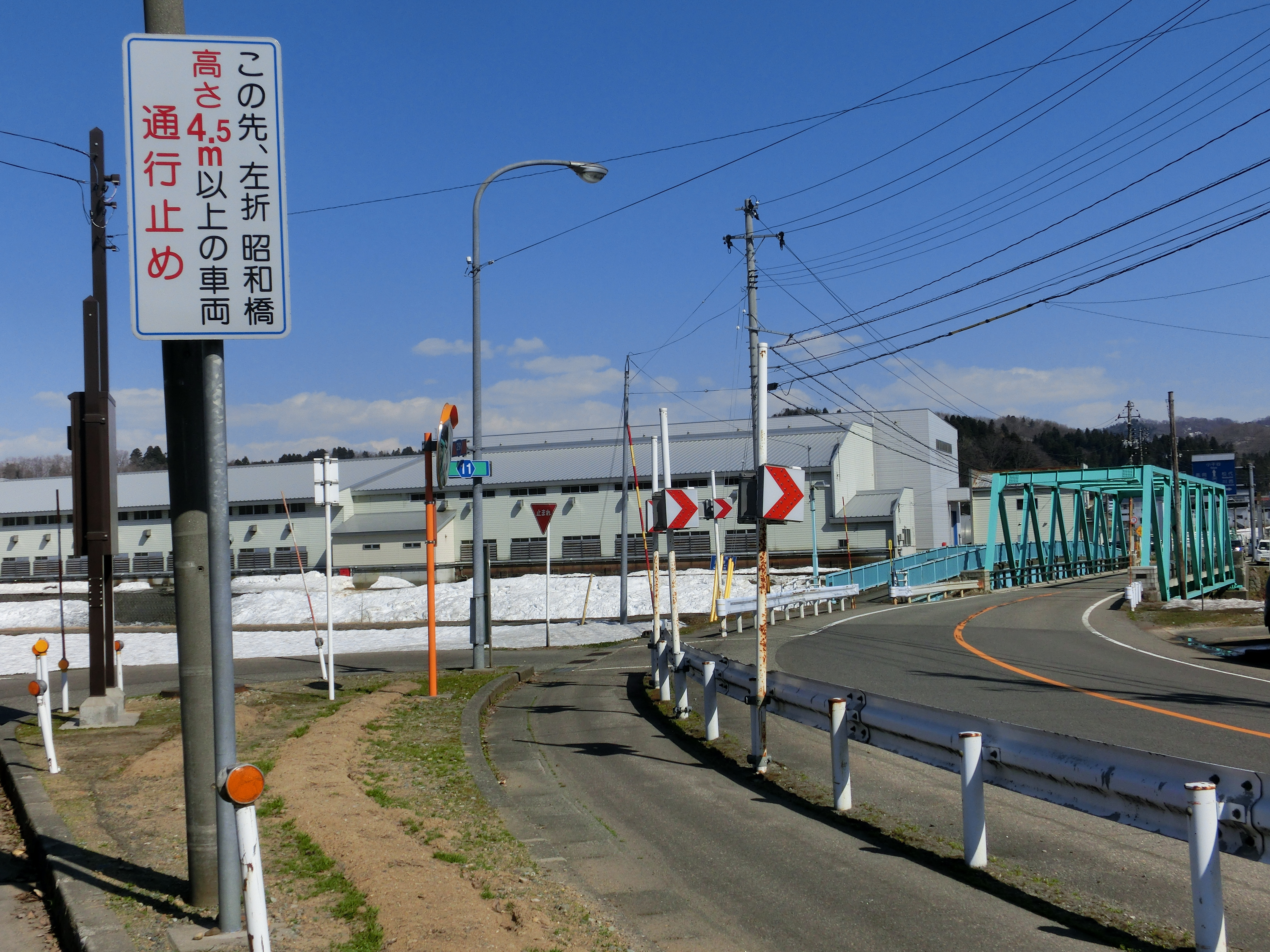 この画像は2018年3月30日投稿者によって新潟県長岡市小国町武石にて撮影された、信濃川支流渋海川に架かる国道291号線昭和橋、及び新潟県道11号柏崎小国線終点（国道291号交点）の写真。 Casio Exilim EX-ZR200